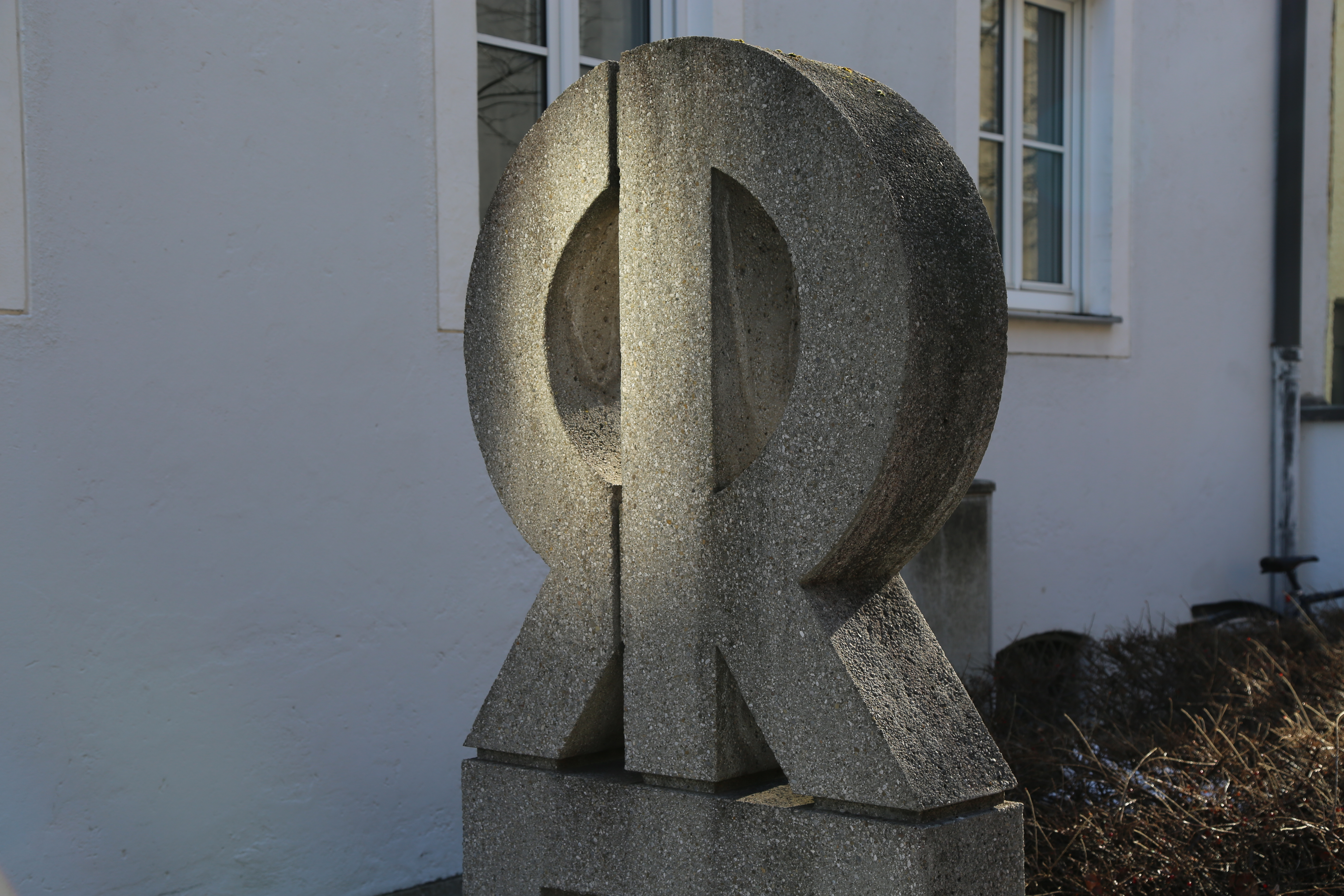 Firmenzeichen der Gebrüder Rank vor dem Gebäude Emil-Geis-Straße 1, München